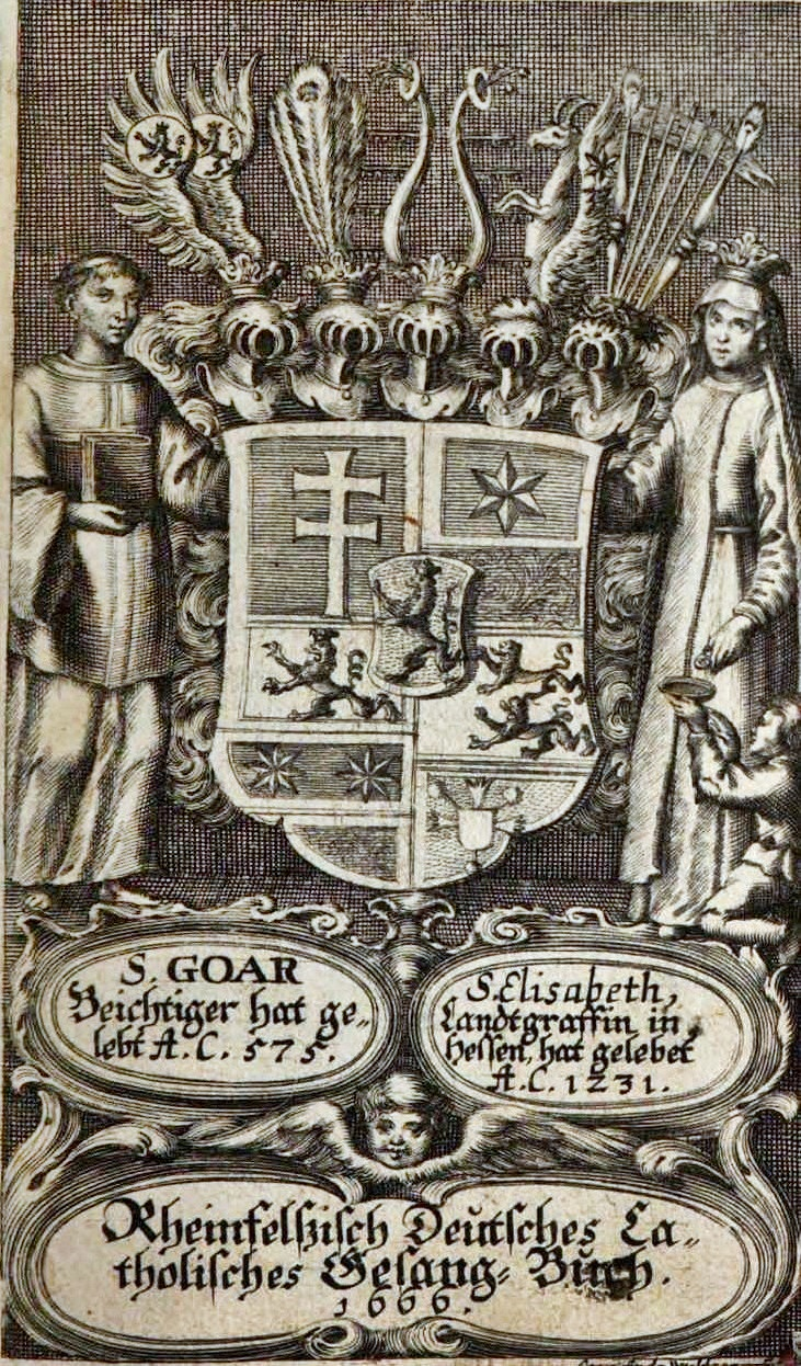 Rheinfelßisch Deutsches Catholisches Gesang-Buch, Titelillustration